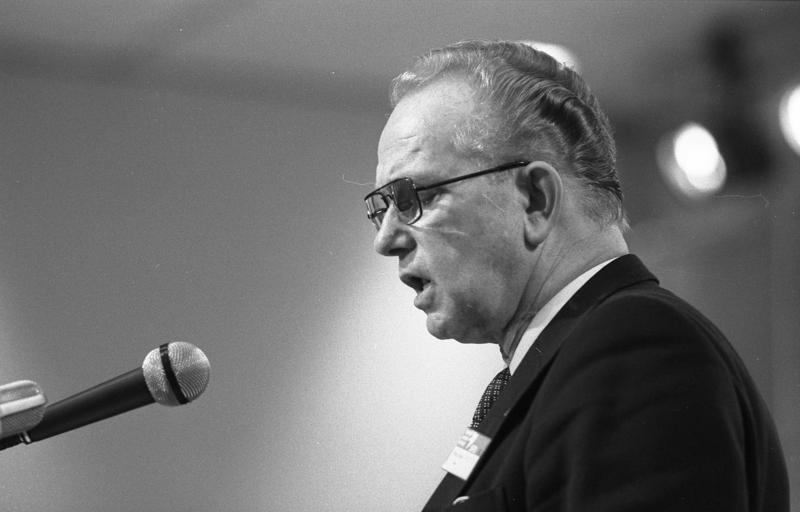 Außerordentlicher Parteitag der SPD im Messe-Kongreß-Zentrum in Köln zur Vorbereitung für die Europa-Parlament-Wahl 1979